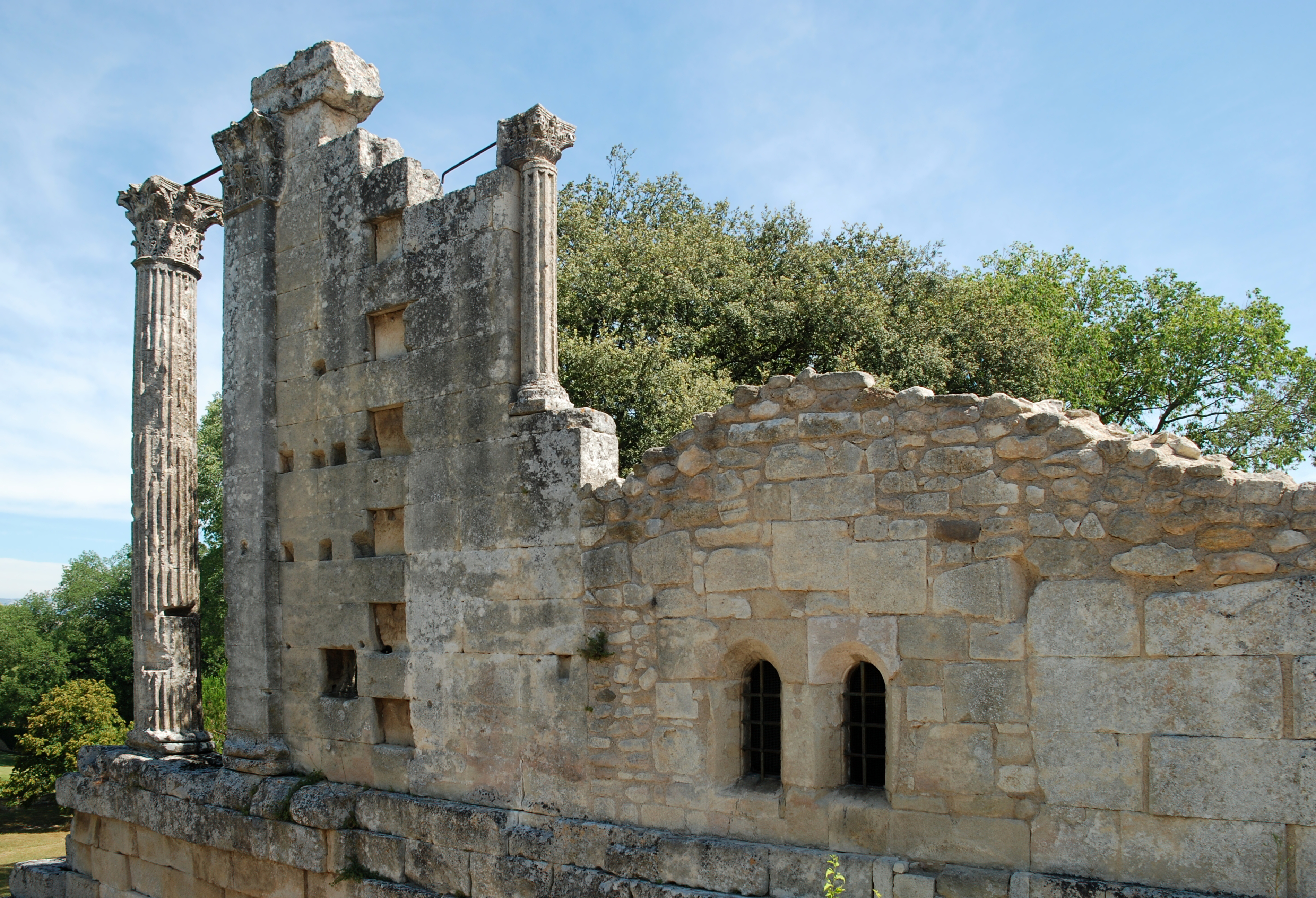 France - Provence - Temple romain de Château-Bas